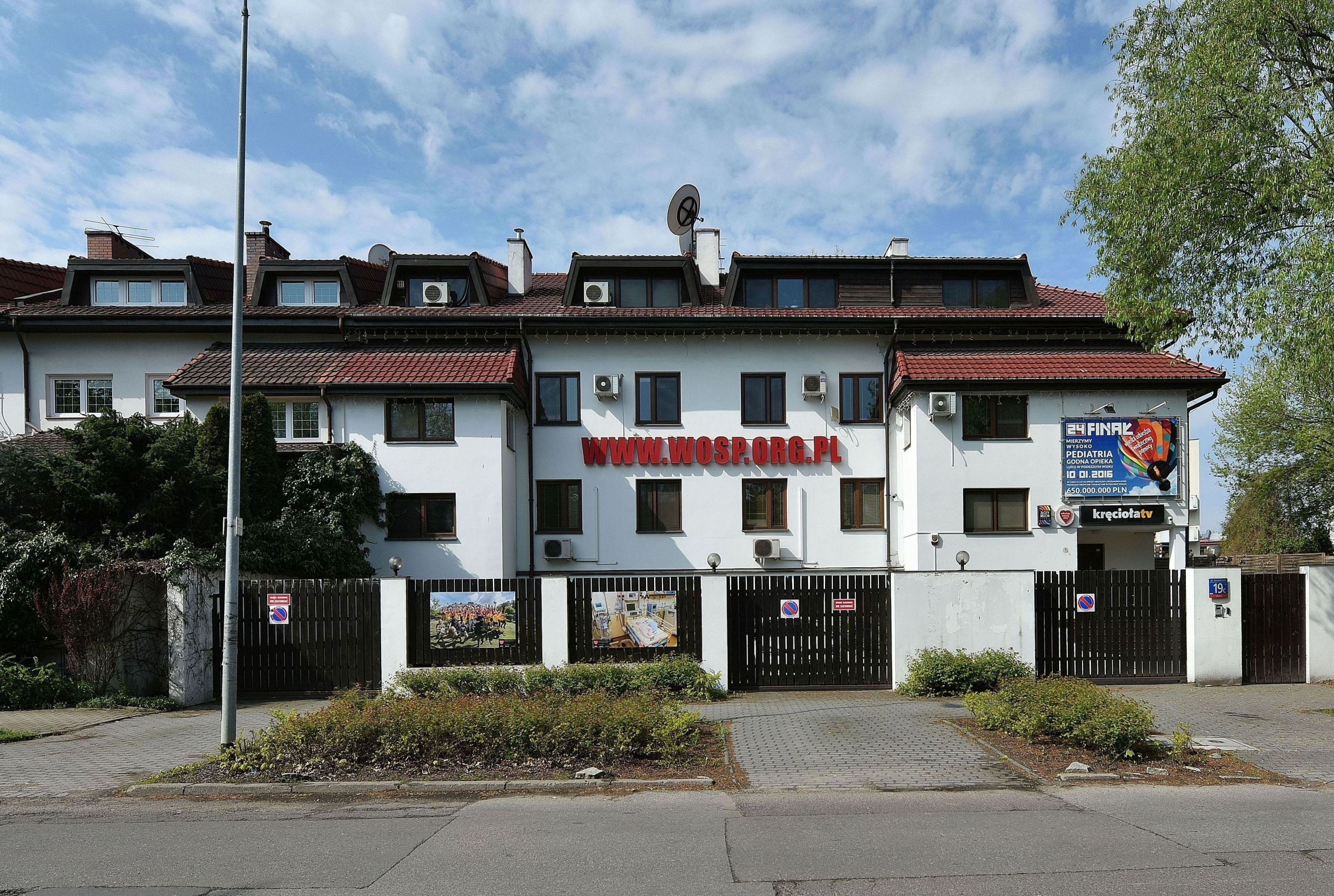 Siedziba Wielkiej Orkiestry Świątecznej Pomocy ul. Dominikańska 19c w Warszawie